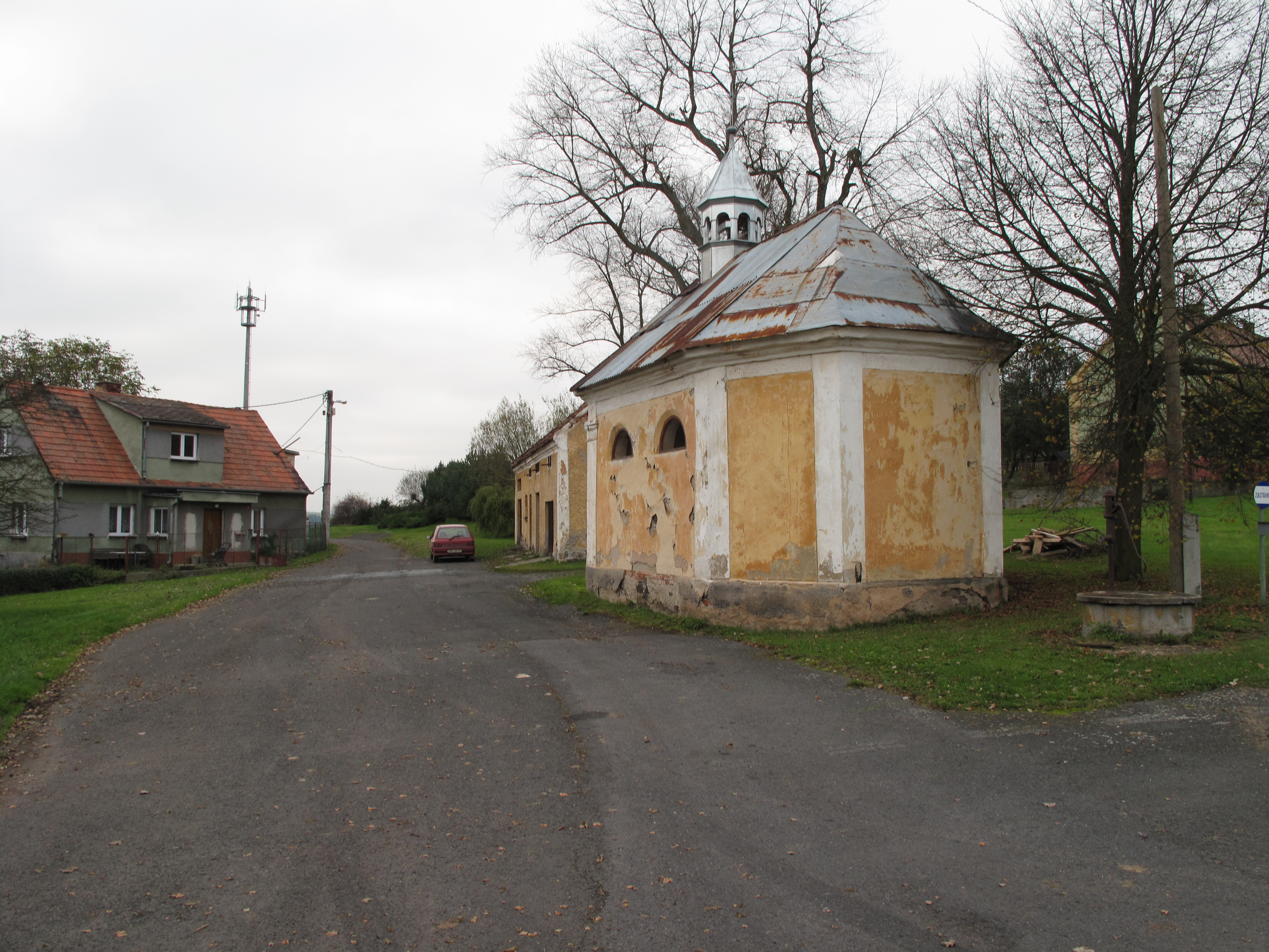 Kaplička v Podštělech. Okres Karlovy Vary, Česká republika.